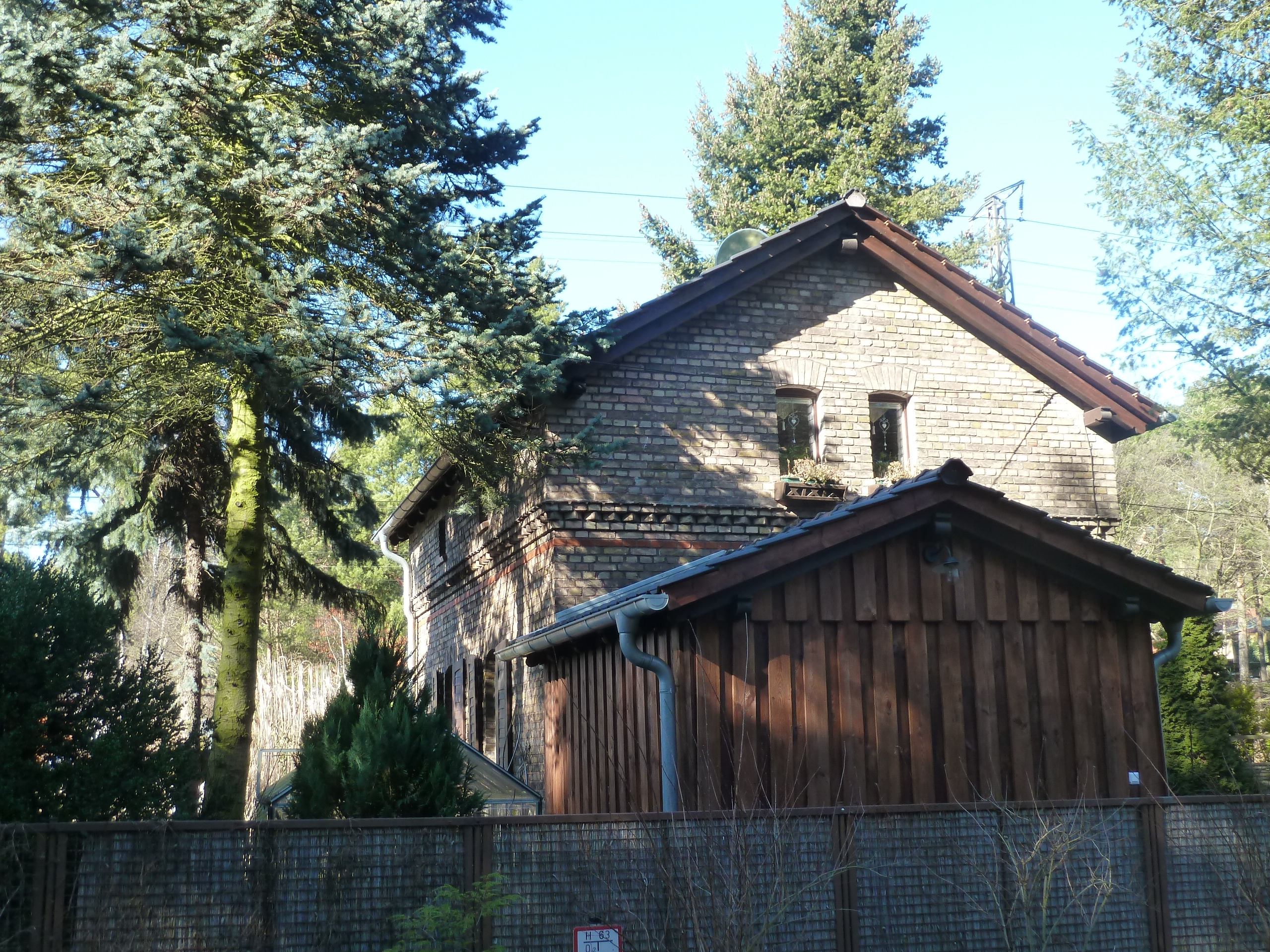 Wilhelmshorst, denkmalgeschütztes ehemaliges Bahnwärterhaus